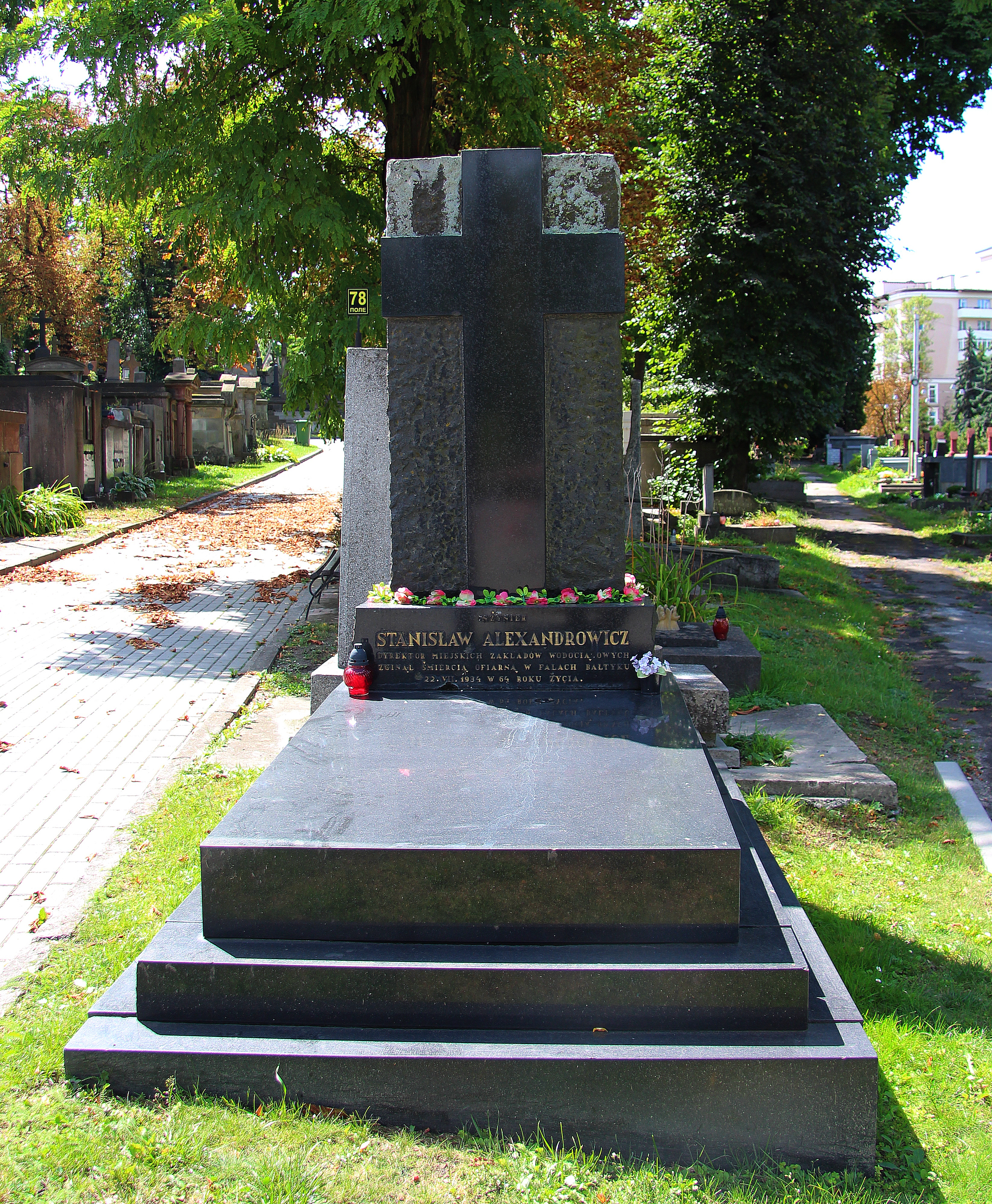 Stanisław Alexandrowicz . Cmentarz Łyczakowski .